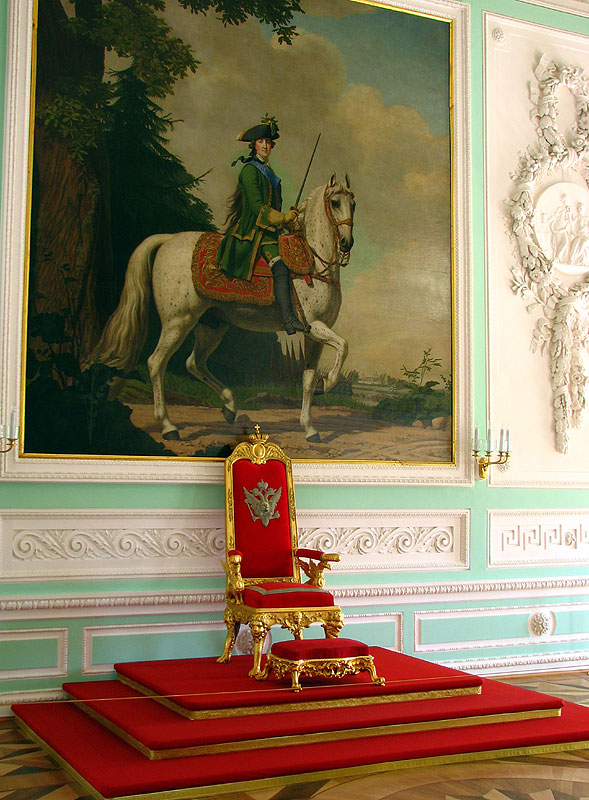 Тронный зал_1